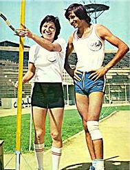 Sedarati and Ghiasi in 1973 during a practice in the old Amjadieh Stadium مریم صدارتی و تیمور غیاثی سال ۱۹۷۳ در ورزشگاه امجدیه